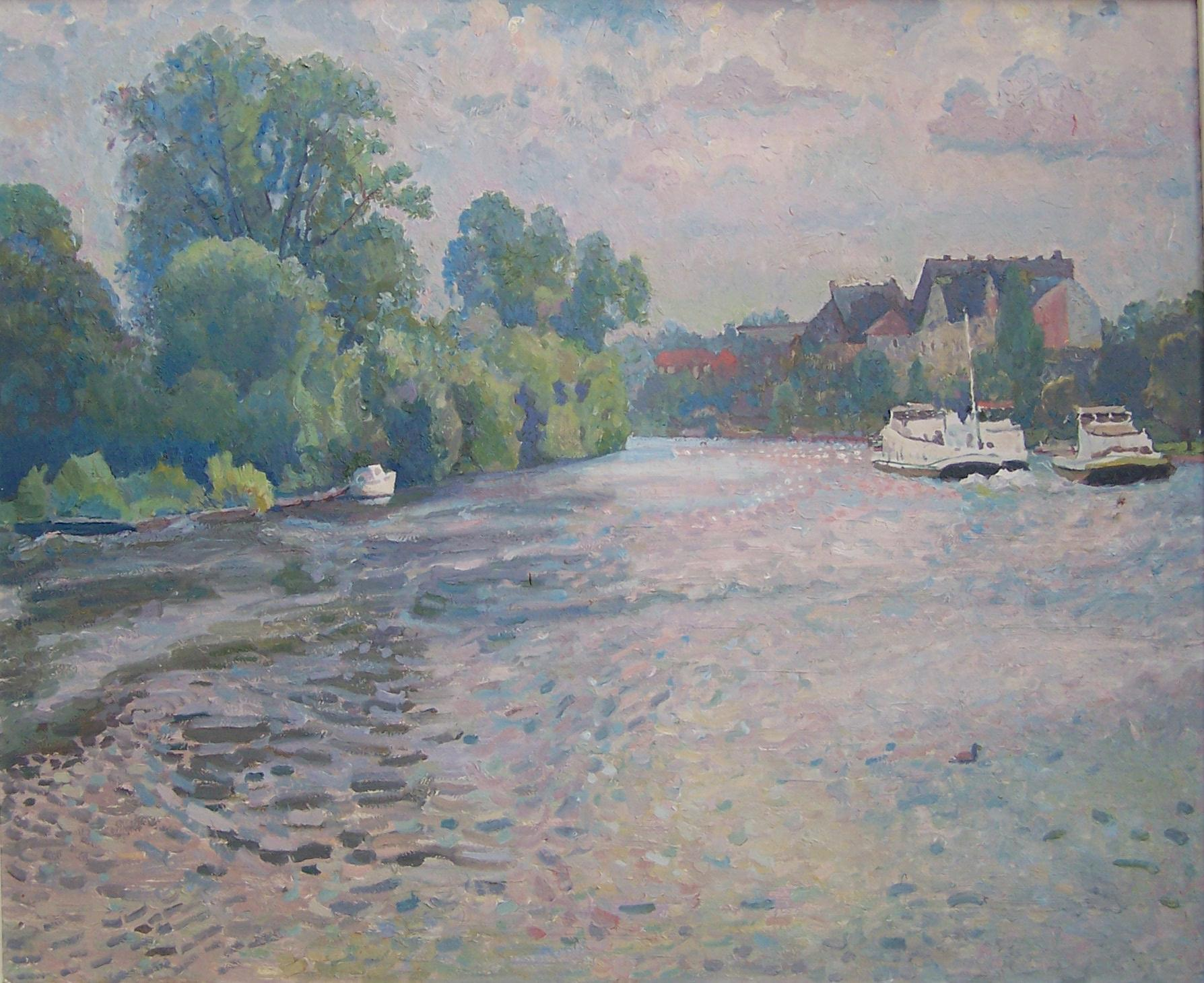 На реке Майн, 1996.